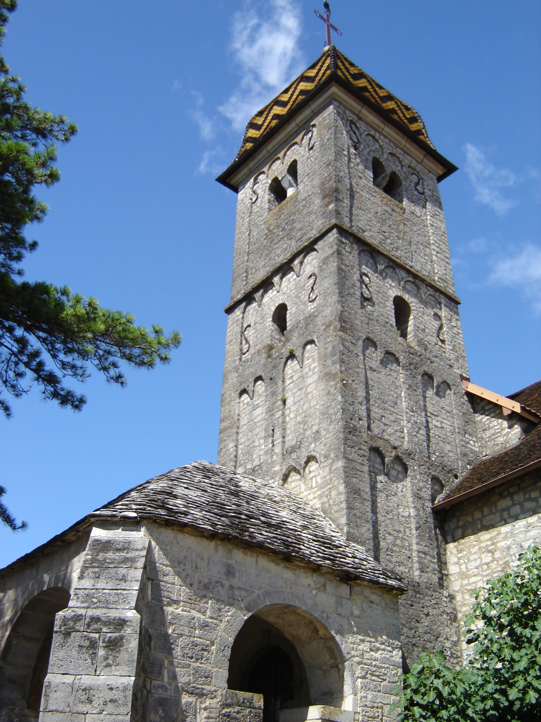 Le clocher (XIème) et le porche (XVIème) de l'église de Boussières dans le Doubs